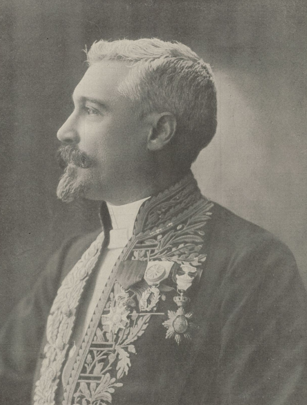 "M. Louis Mouttet, gouverneur de la Guyane française (septembre 1898 à juillet 1901), actuellement gouverneur de la Martinique".